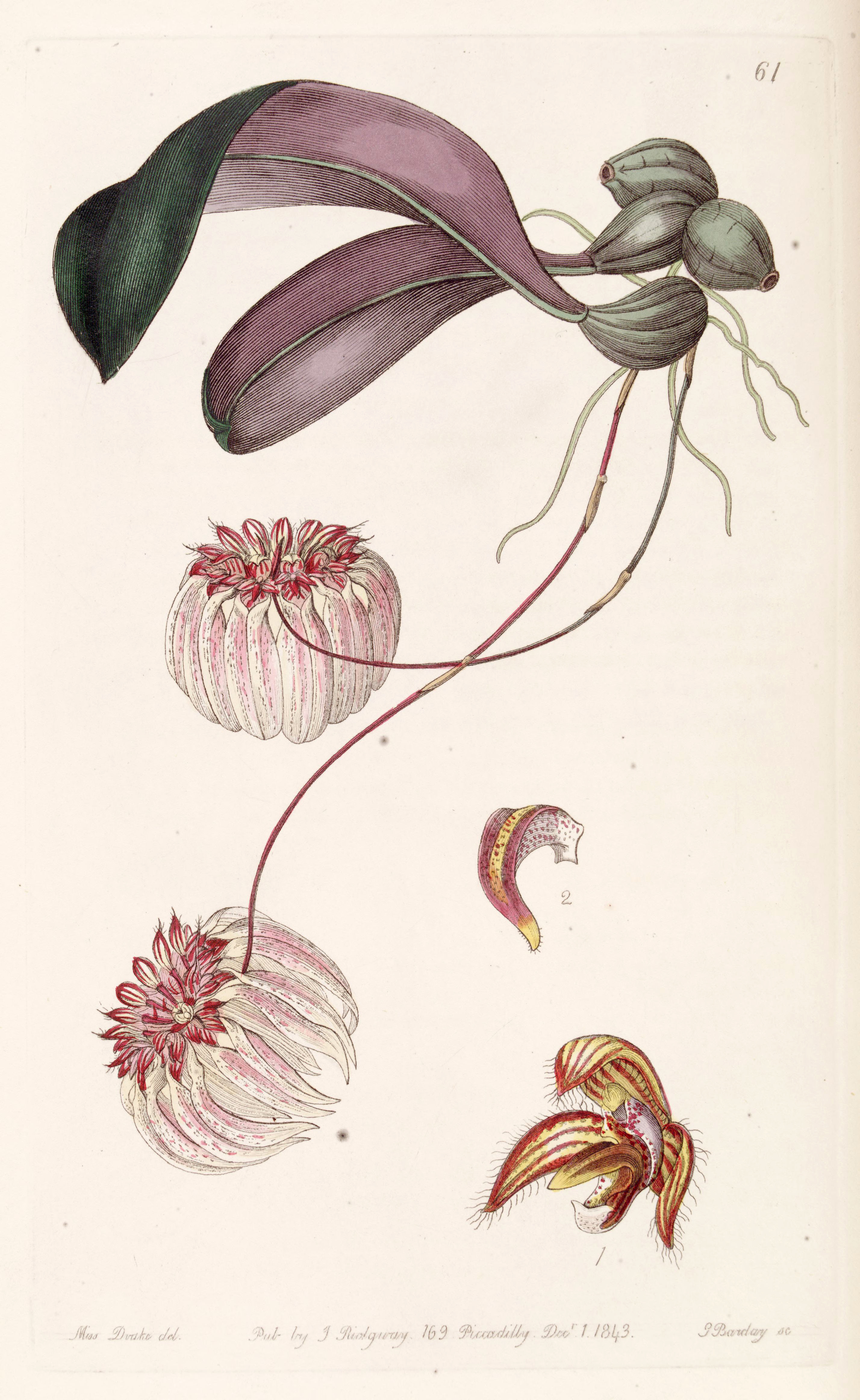 Bulbophyllum auratum (as syn. Cirrhopetalum auratum)